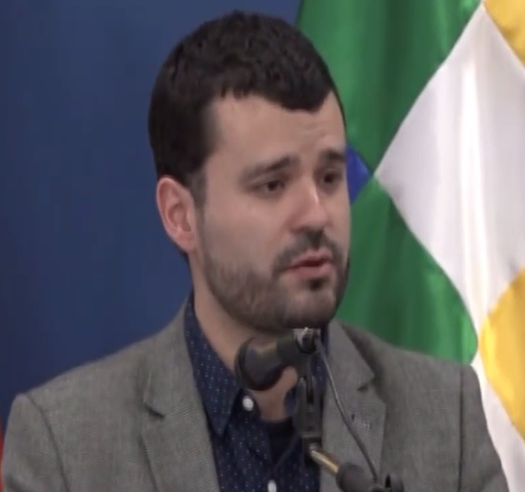 Ministro Manuel Canelas Jaime en mayo de 2019